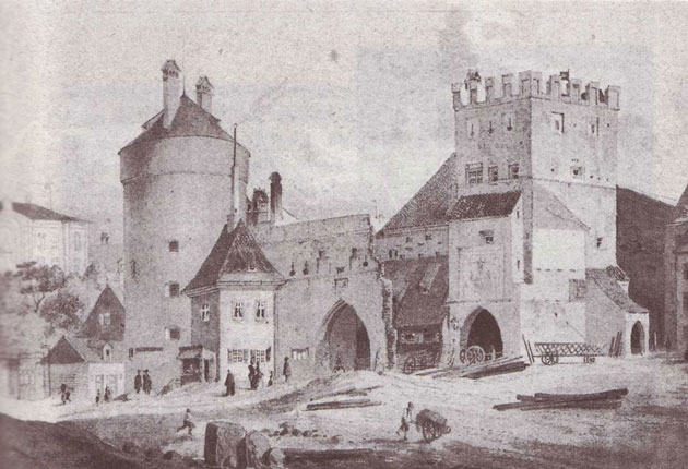 Das Kosttor (rechts) mit dem Neuturm (links) in München